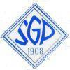 Logo der SG Praunheim